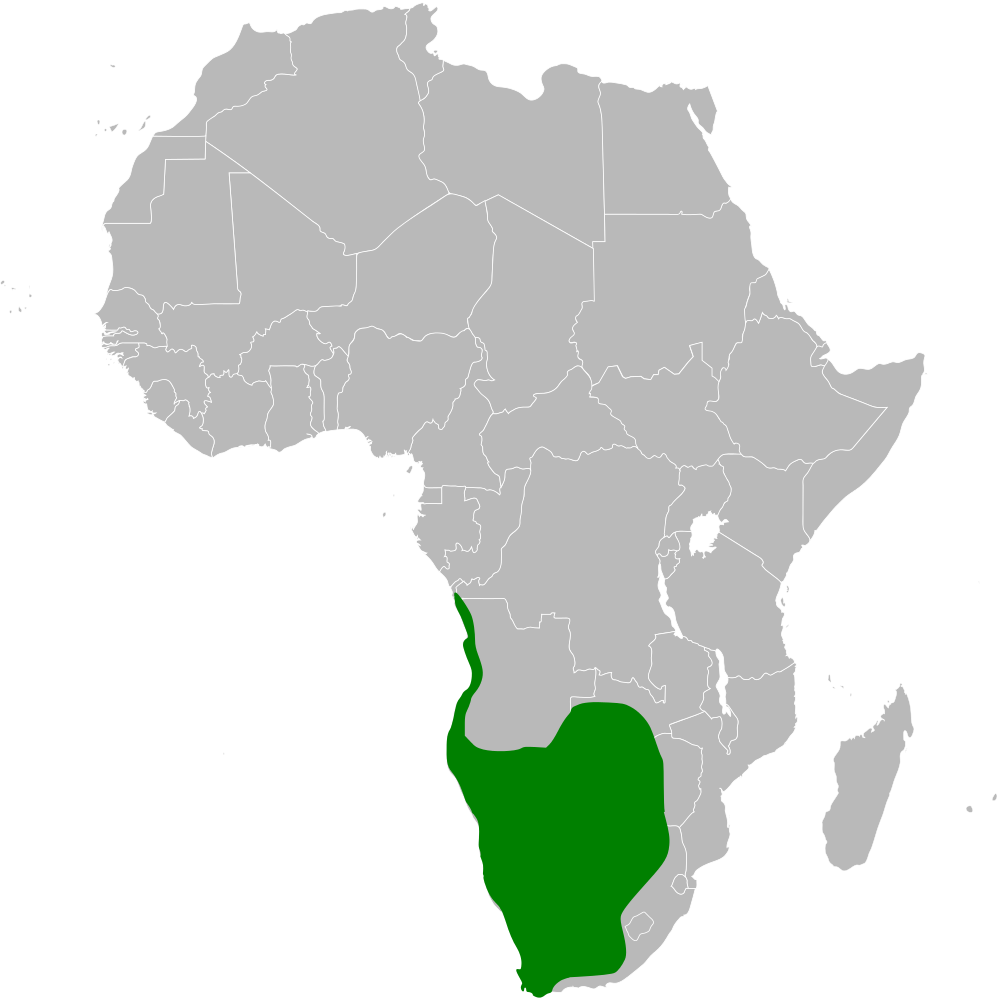 Eremopterix verticalis distribution map, based on